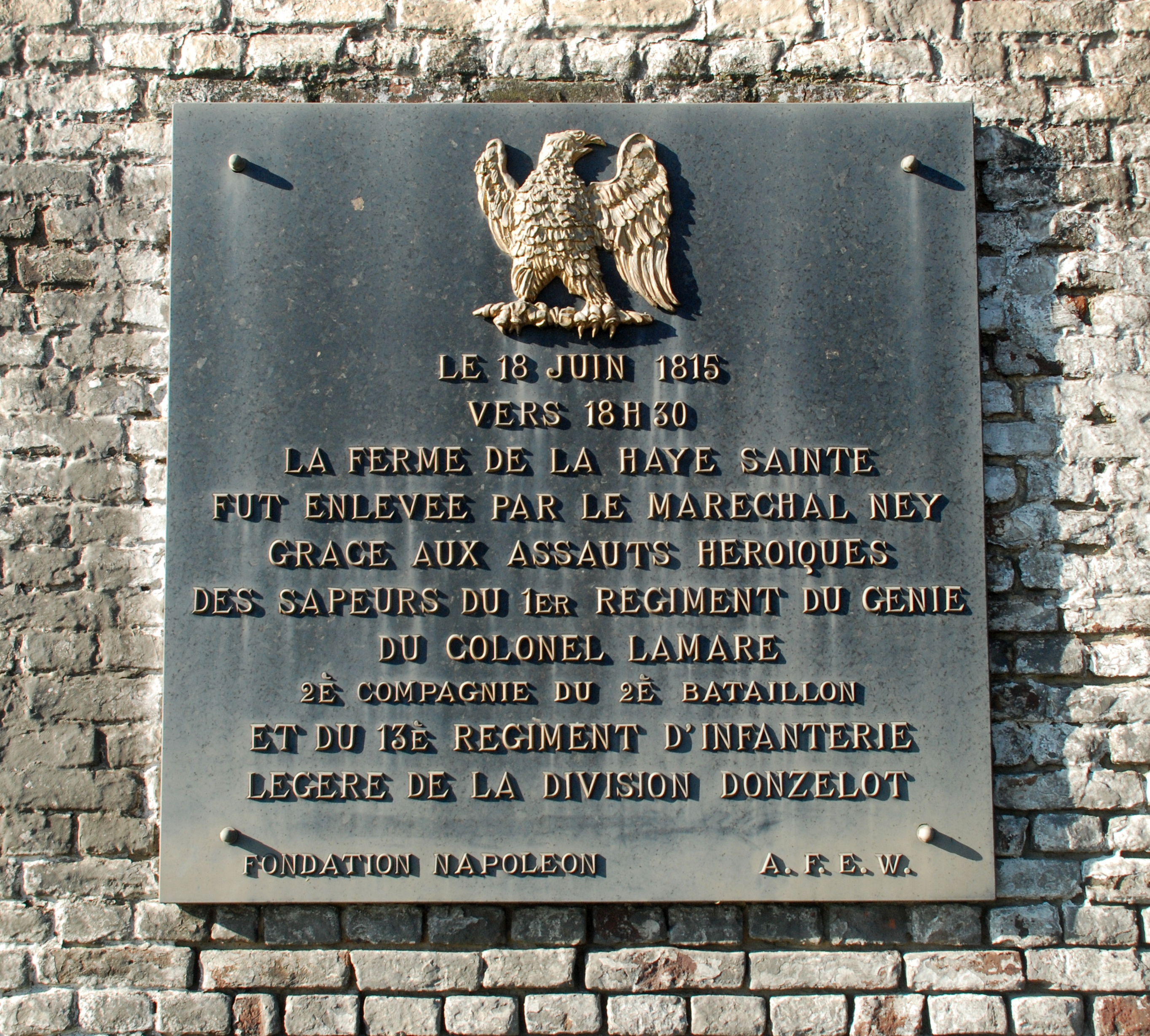 Belgique - Brabant wallon - Lasne - Plancenoit - Ferme de la Haie Sainte (bataille de Waterloo)